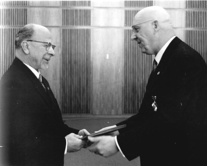 Zentralbild Junge 8.4.1968 bgm Berlin: Neue Verfassung der DDR - Feierlicher Staatsakt im Amtssitz des Staatsrates am 8.4.1968. In einem festlichen Staatsakt im Amtsstiz des Staatsrates der DDR nahm der Vorsitzende des Staatsrates der DDR, Walter Ulbricht, in Anwesenheit führender Persönlichkeiten den Bericht der Zentralen Abstimmungskommission über das Ergebnis des Volksentscheides entgegen und verkündete feierlich die durch das Volk am 6. April beschlossene Verfassung der DDR. Auf unserem Foto: Der Vorsitzende der Zentralen Abstimmungskommission, Dr. Heinrich Homann, übergibt dem Vorsitzenden des Staatsrates, Walter Ulbricht, das endgültige Ergebnis des Volksentscheides.